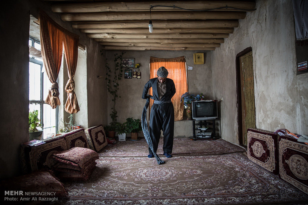 مناطق سردسیر و دیدنی کردستان به دلیل جریان زندگی سنتی و اصیل همواره از جاذبه‌های گردشگری این استان بوده و مردم در این مناطق به خوبی با شیوه زندگی در نقاط بکر و دست‌نخورده آشنا هستند. بلکر یکی از روستاهای زیبا در ۸۵ کیلومتری مریوان است، مردم این روستا به شیوه سنتی لباس می‌پوشند و به مشاغل سنتی نیز مشغول هستند. زنان و مردان در کنار یکدیگر به دامداری اشتغال دارند و وظیفه تربیت و نگهداری از فرزندان نیز بر عهده زنان روستا است. بارش برف در برخی ماه‌های سال به اندازه‌ای است که رفت و آمد و زندگی روزمره را دچار مشکل می‌کند، مردان روستا از صبح به پشت‌بام‌ها و خیابان‌ها می‌روند و به کمک پاروی چوبی برف‌روبی می‌کنند تا مردم و کودکان بتوانند در روستا تردد کنند. خانواده‌هایی که زمستان را در روستای بلکر سپری می‌کنند، به یکدیگر کمک می‌کنند تا با عشق و امید به کمبود امکانات و سرمای زمستان غلبه کنند.